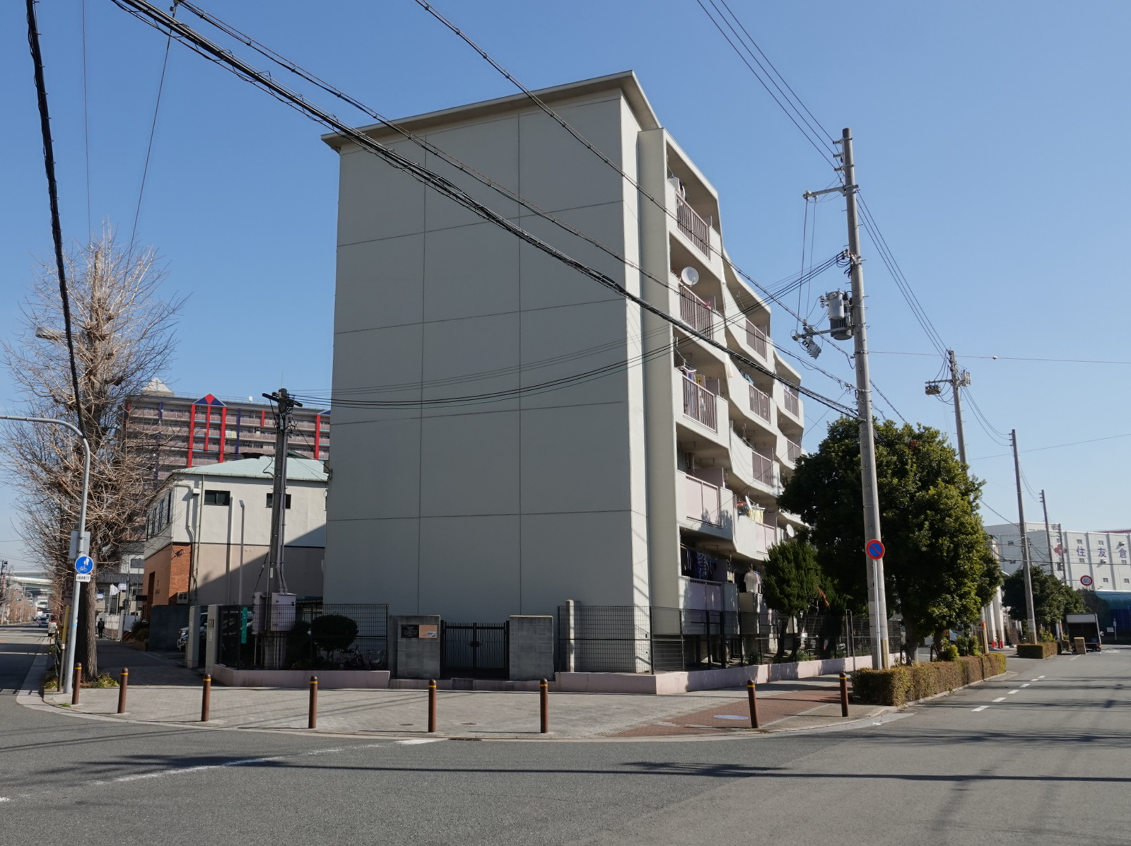 築港大潮湯跡